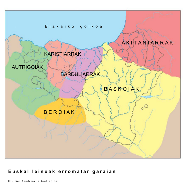 Euskal leinuak erromatar garaian, UEUren kondaira.eus webgunetik hartua.